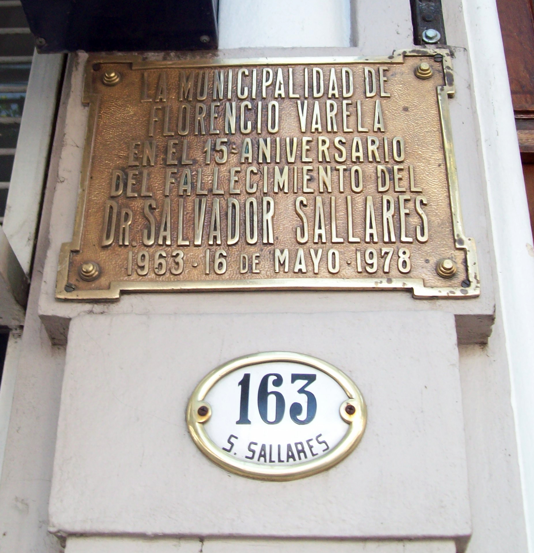 Placa en la casa en donde atendía el Doctor Sallarés, en el cartel de abajo se puede ver la dirección de su casa, en la calle de su mismo nombre.